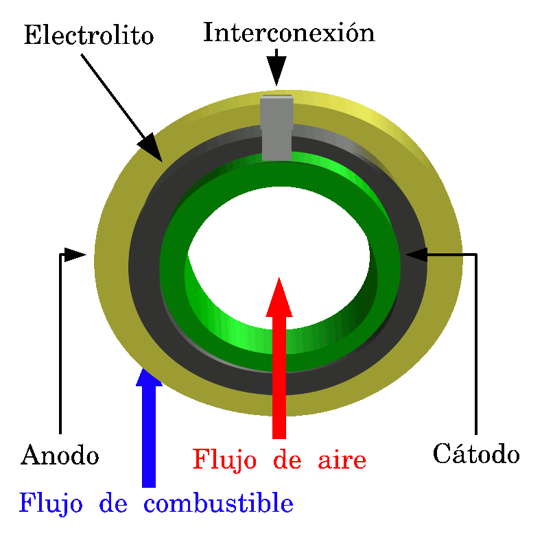 Esquema de una sección transversal de una pila de combustible de óxido sólido (SOFC) tubular